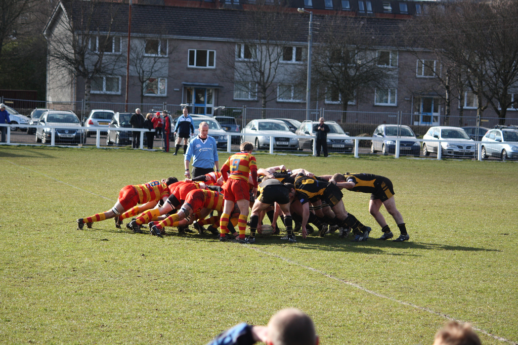 A scrum at Burnbrae.